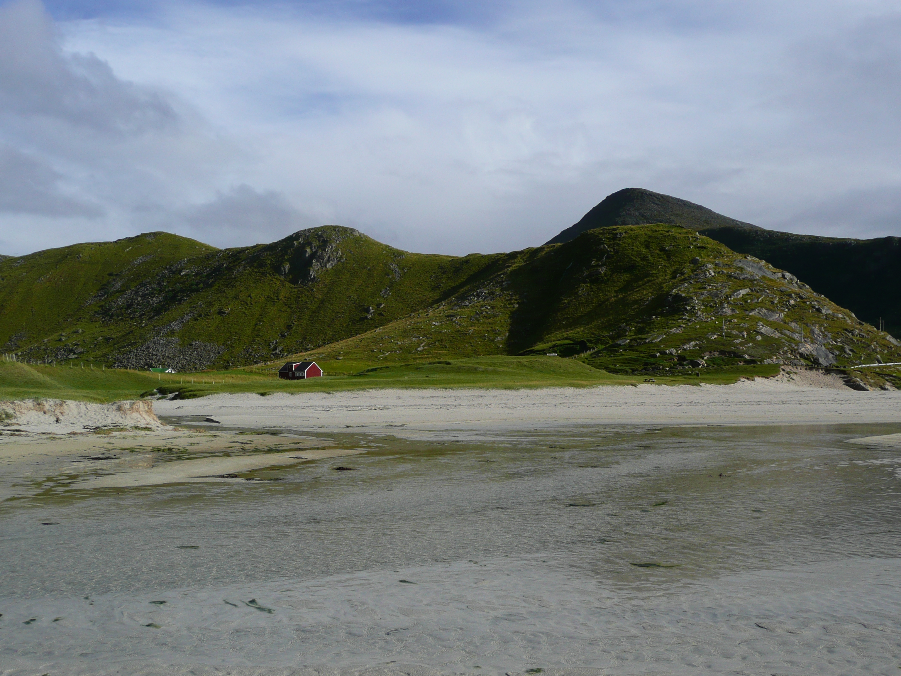 Hauklandstrand, Vestvågøy, Lofoten, Norway.